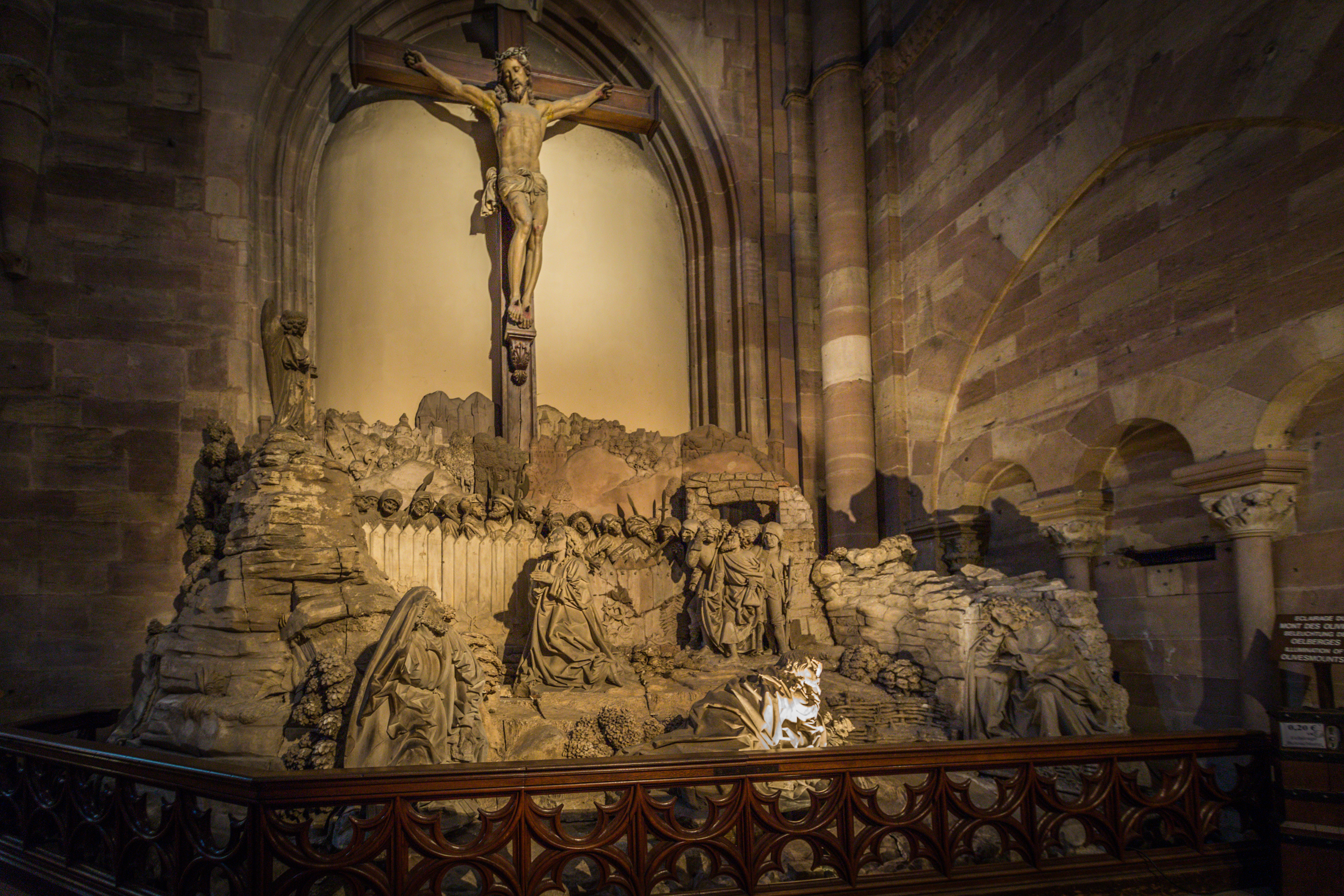 Strasbourg Cathédrale Notre-Dame Le Mont des Oliviers